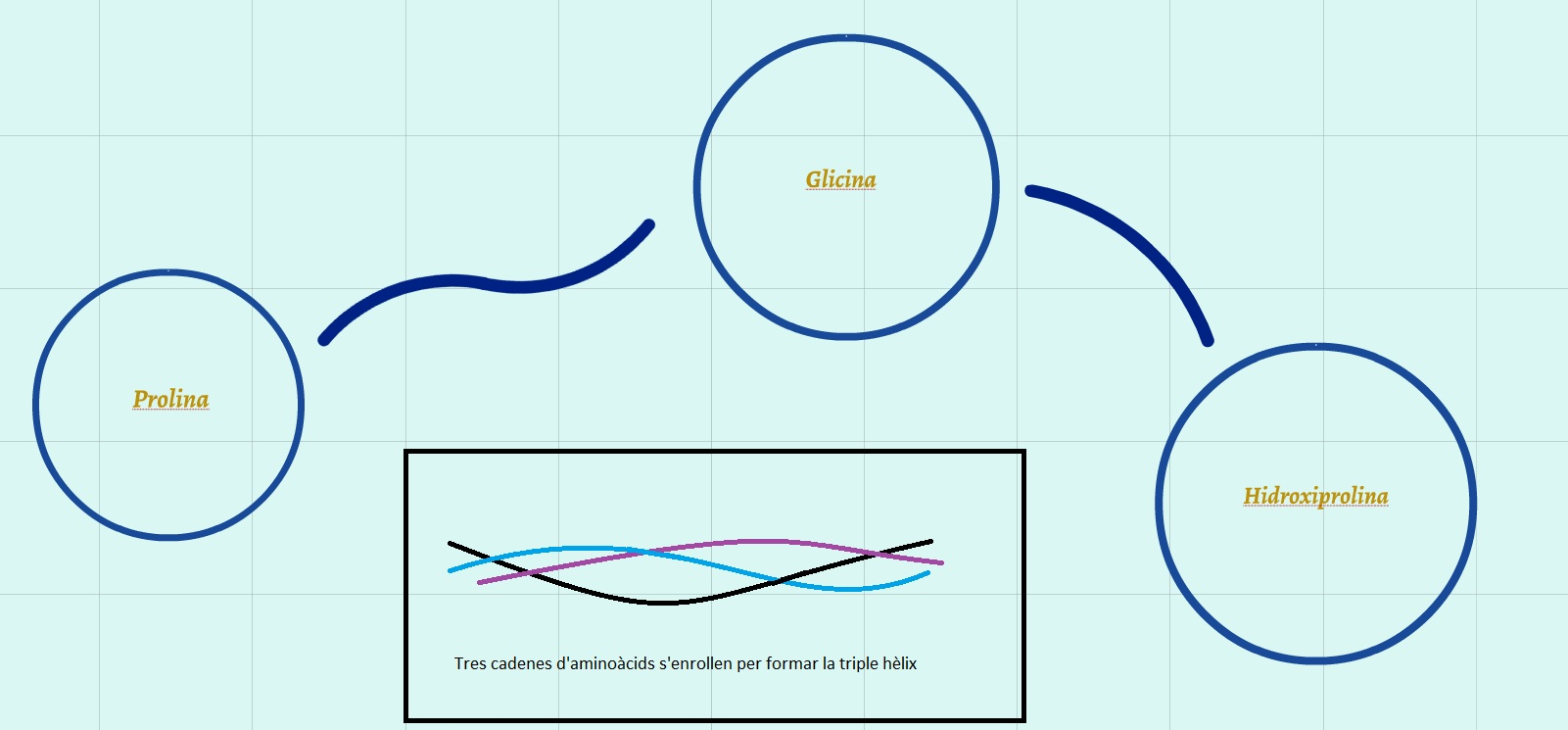 Seqüència d'aminoàcids d'una cadena del colàgen